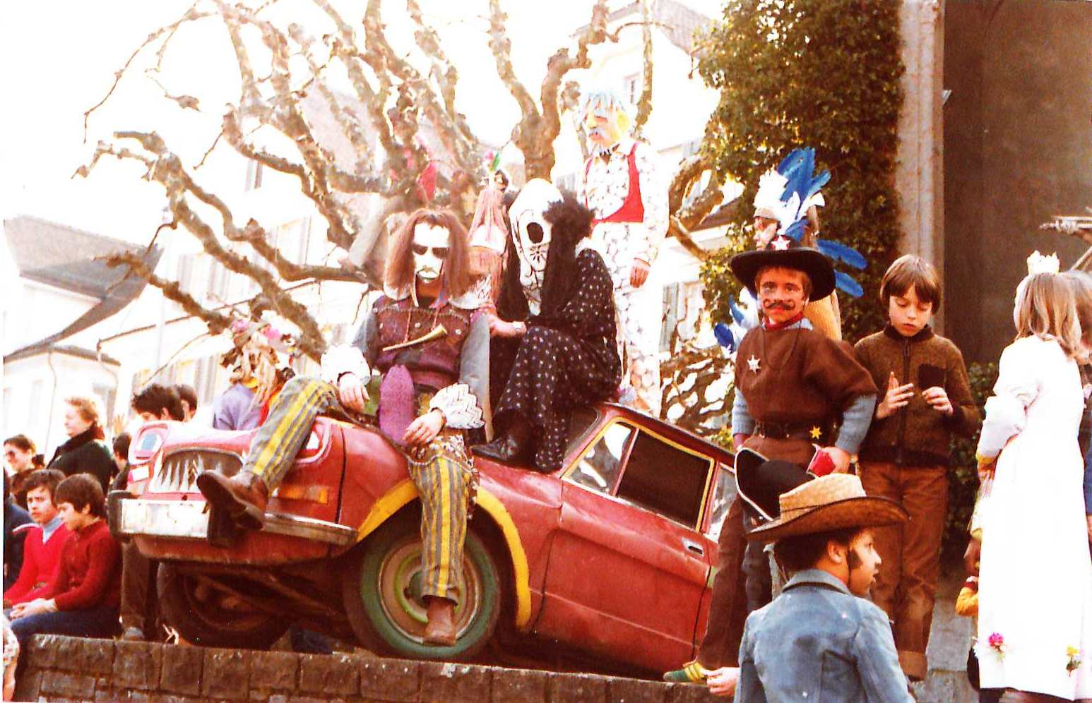 Fasnachtsgruppe Sämili 1980 in Stans mit dem Motto "Grosse Pauke: Typ Zitron Döschwo Peng". Aufnahme vor dem Winkelrieddenkmal.